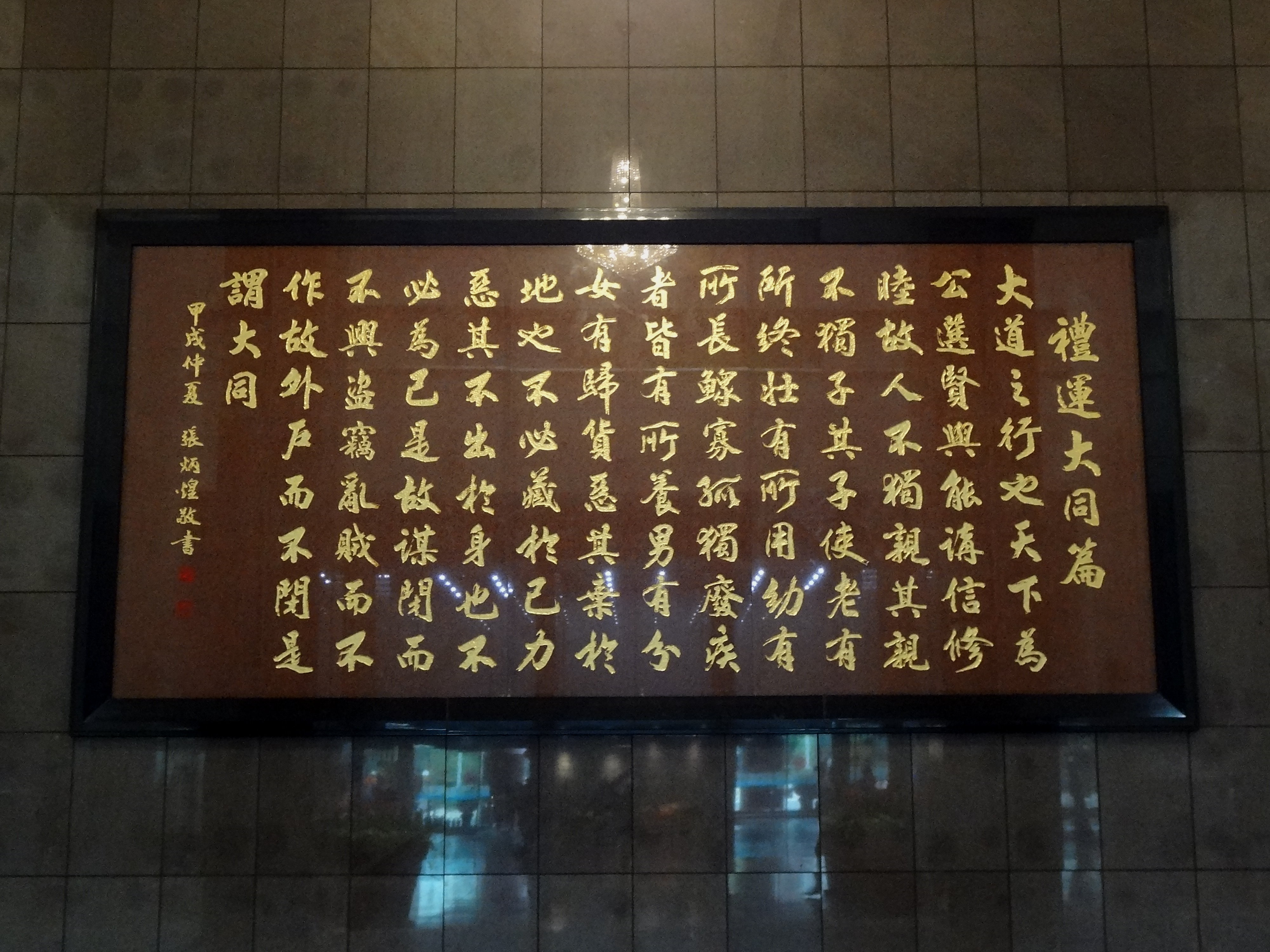 臺北市市政大樓1樓沈葆楨廳牆上的《禮記》禮運大同篇張炳煌書法刻石。